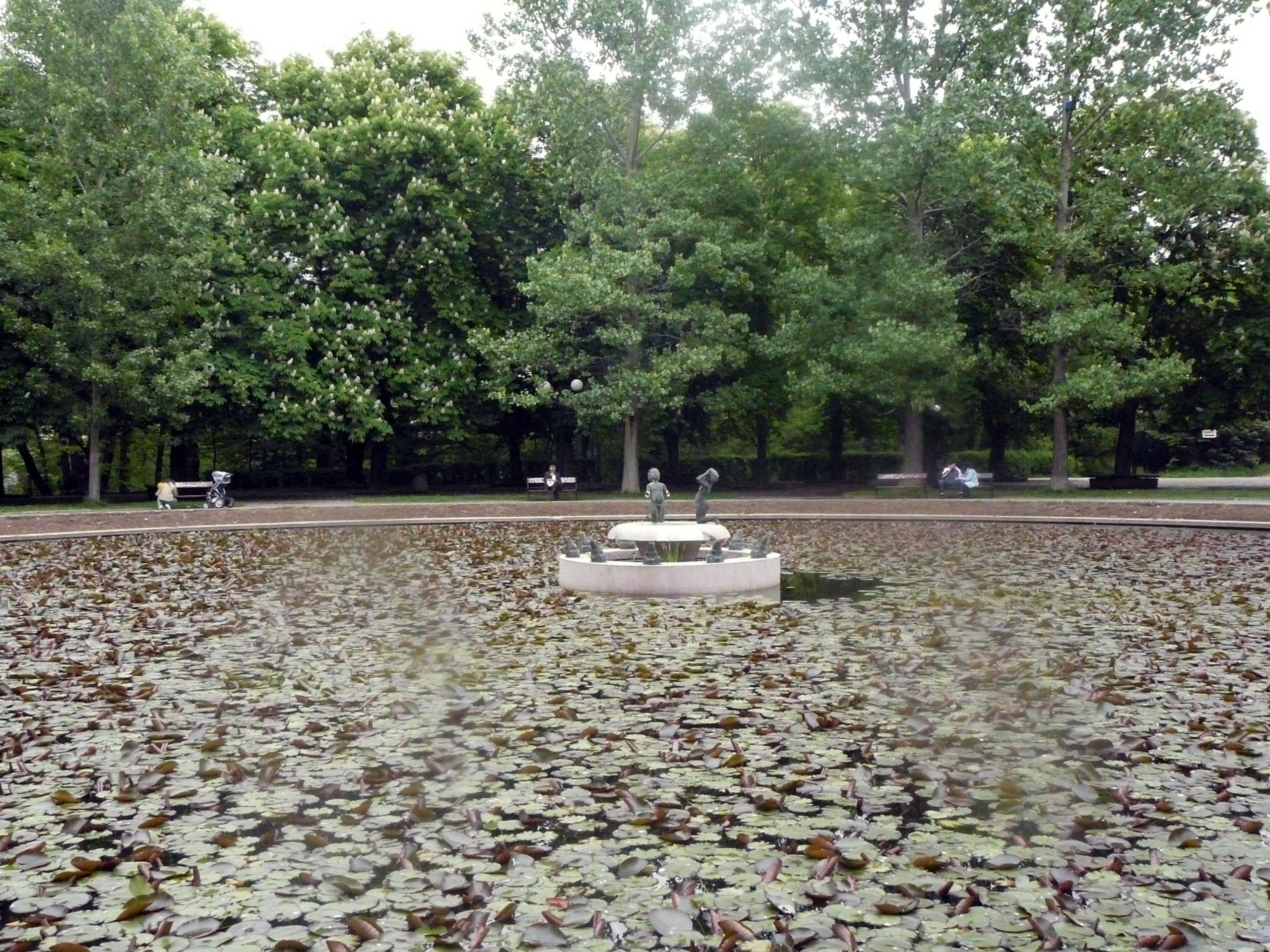 Borisova garden in Sofia,Bulgaria